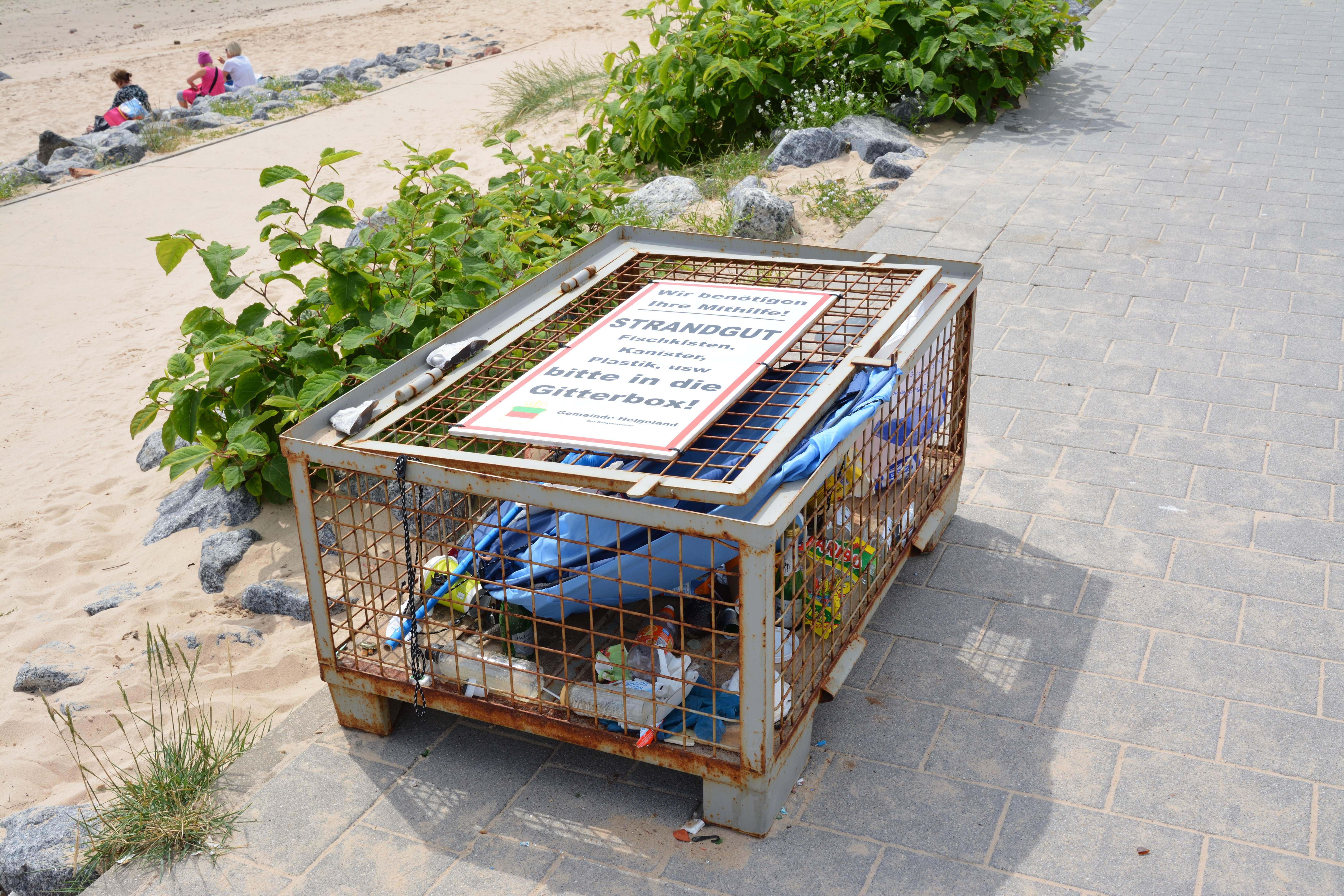 Bilder von Helgoland im Juli 2019Strandgutsammelbox am Südstrand